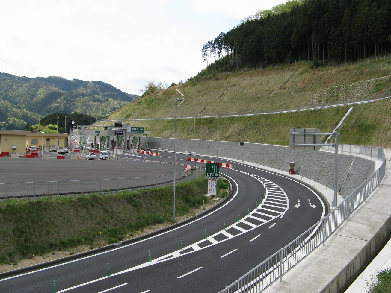 京丹波わちIC